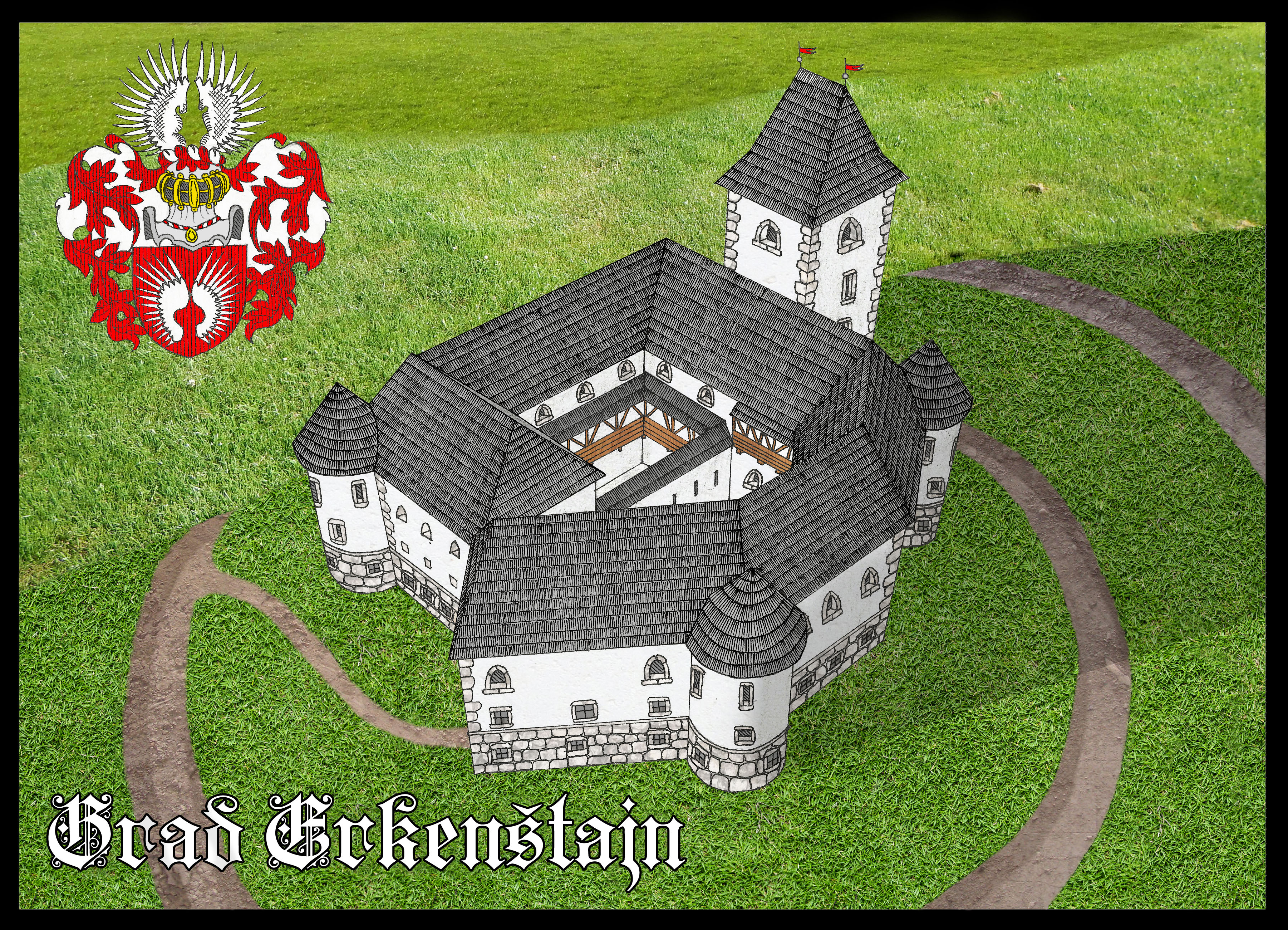 Poskus Rekonstrukcije gradu Erkenštajn pri Sevnici v 16. stol. Delano s pomočjo skicne osnove doc. dr. Igorja Sapača. Grb plemiške družine Altenhaus (lastniki gradu v 16. stol.).